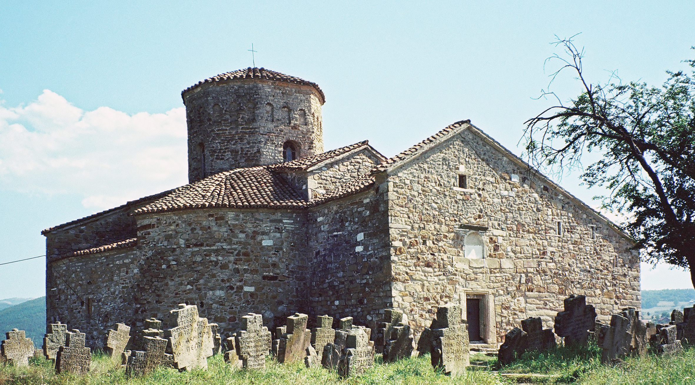 Petrova crkva